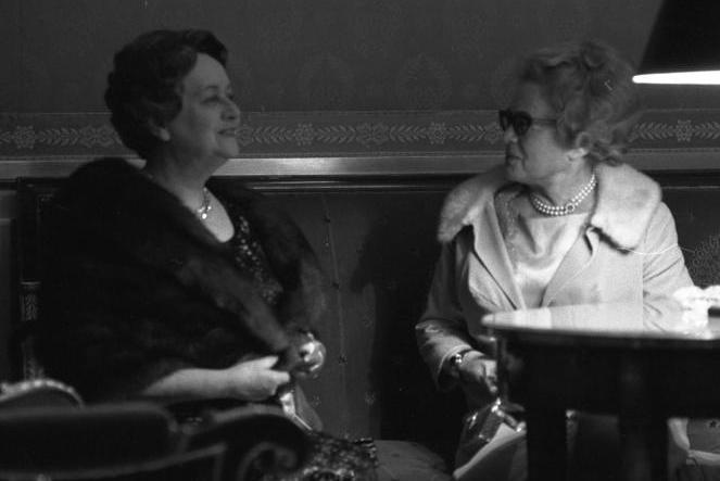 Einweihung der deutschen Botschaftsresidenz, Palais Beauharnais, in Paris: Empfang für Staatspräsident de Gaulle mit Bundespräsident Lübke.